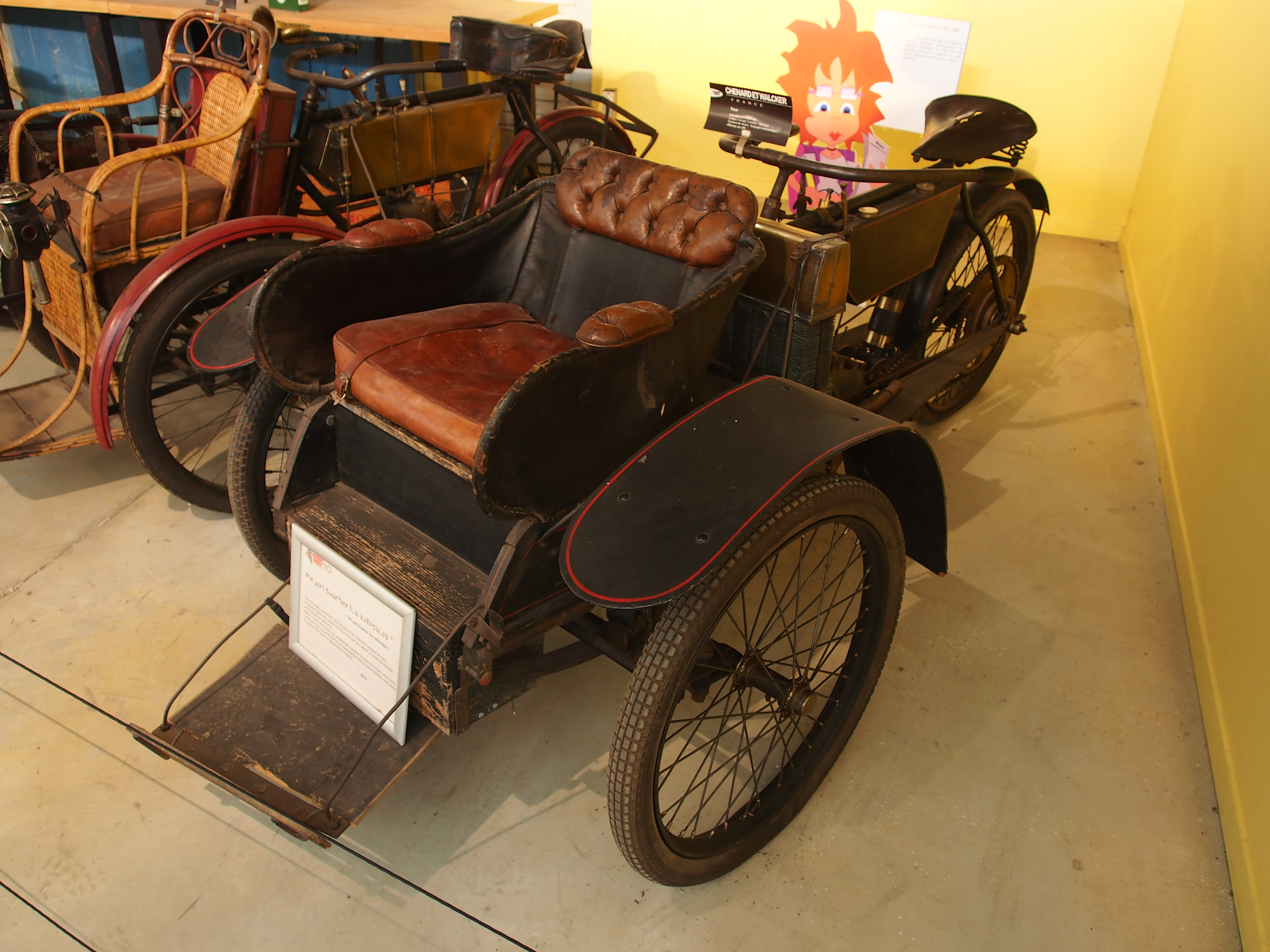 Photographed at the Musée de la Moto et du Vélo, Amneville, France.